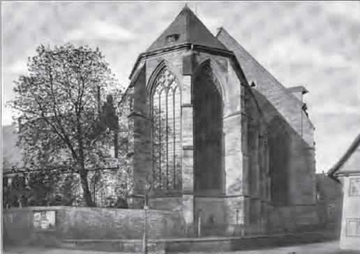 Kirche Neu-St. Thomas, Kirche des ehemaligen Franziskanerklosters Soest